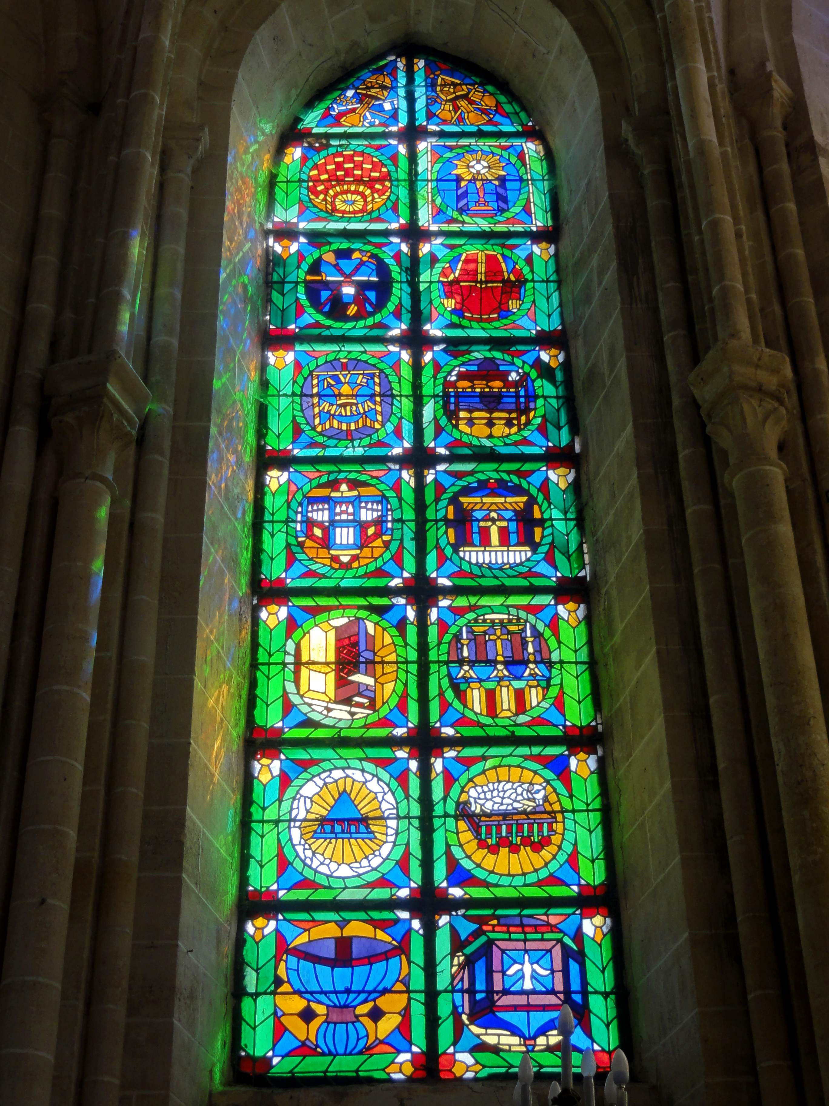 Verrière n° 1 (pan nord-est de l'abside), instruments liturgiques et objets du culte, réalisée en 1849 par l'abbé Théodore-Cyrille Deligny (Francières 1808 - Compiègne 1887), curé de Jonquières de 1834 à 1861. Représentation, du haut vers le bas et de gauche à droite : pape, évêque, chape rouge à l'envers, ostensoir, hallebarde canne épée bicorne tricolore, livrée de Suisse à l'envers, bannière Ave Maria, dais du Saint-Sacrement, orgue, tabernacle, confessional, autel, gloire avec tétragramme, Agnus Dei sur le livre aux sept sceaux, fonts baptismaux, chaire à prêcher avec la colombe du Saint-Esprit.